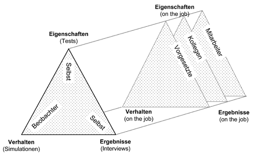 Illustration der Prinzipien "Multi-Methodalität" und "Multi-Perspektivität"